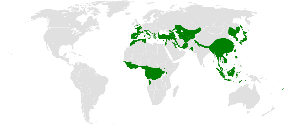 Cettiidae distribution map